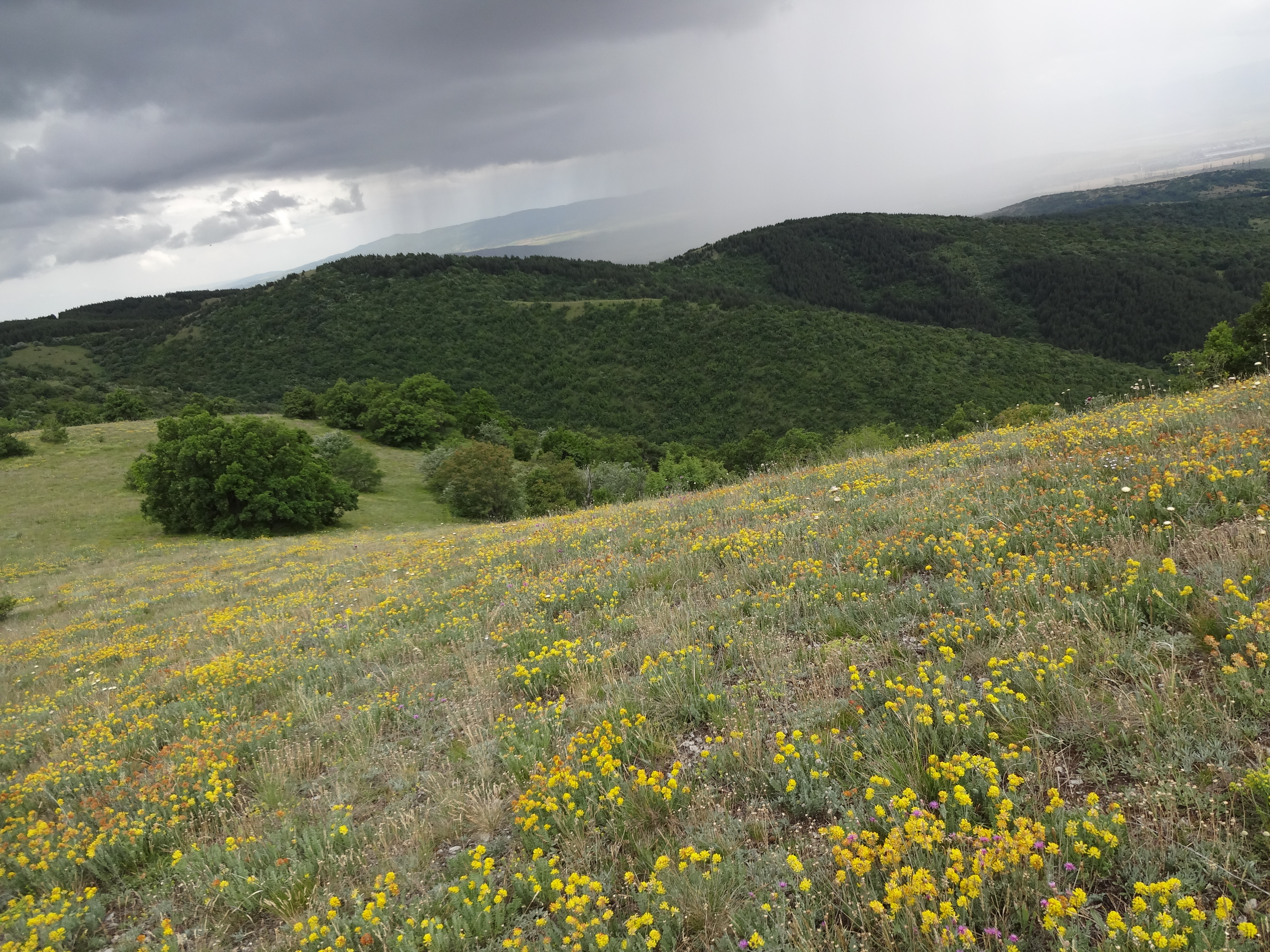 Гледка към Голо Бърдо планина